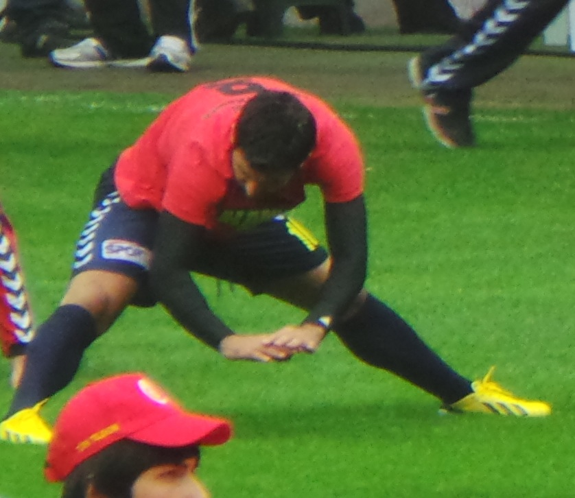 Culio Mersin ile